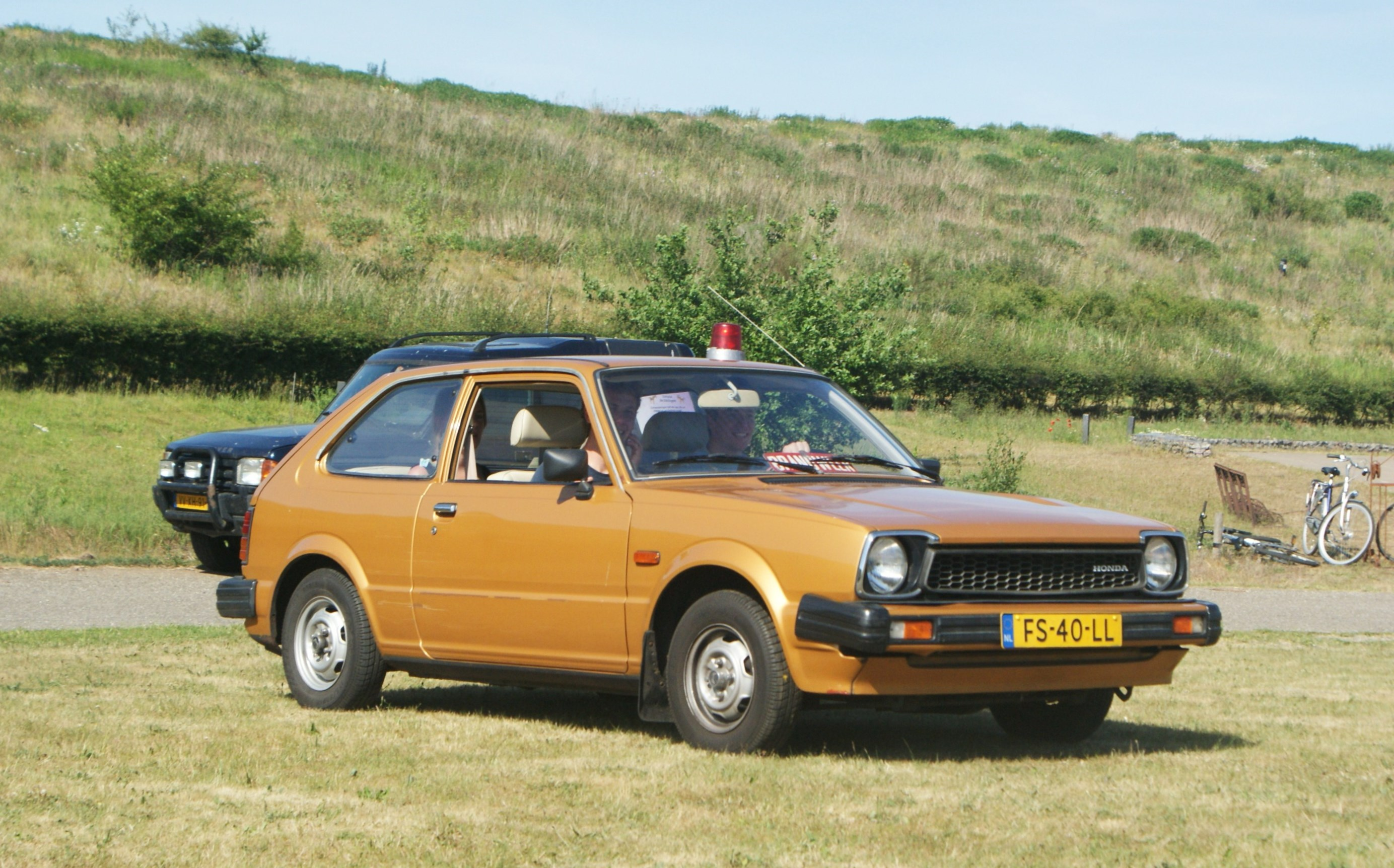 FS-40-LL